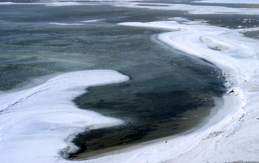 Jezioro Urmia (Darjacze-je Orumije) - sól na brzegu niedaleko miasta Urmia (Orumije)